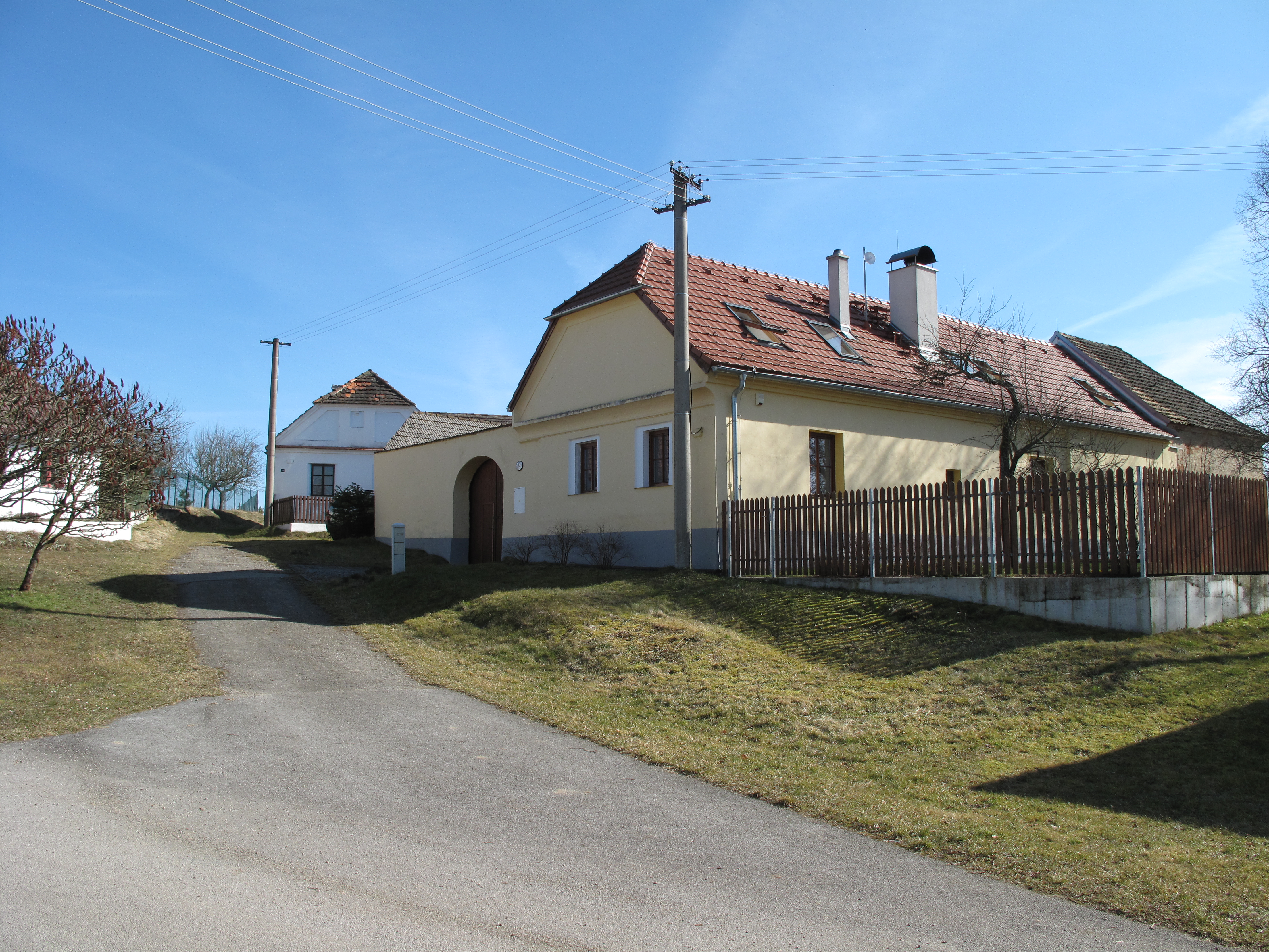 Domy v Šipouně. Okres Prachatice, Česká republika.